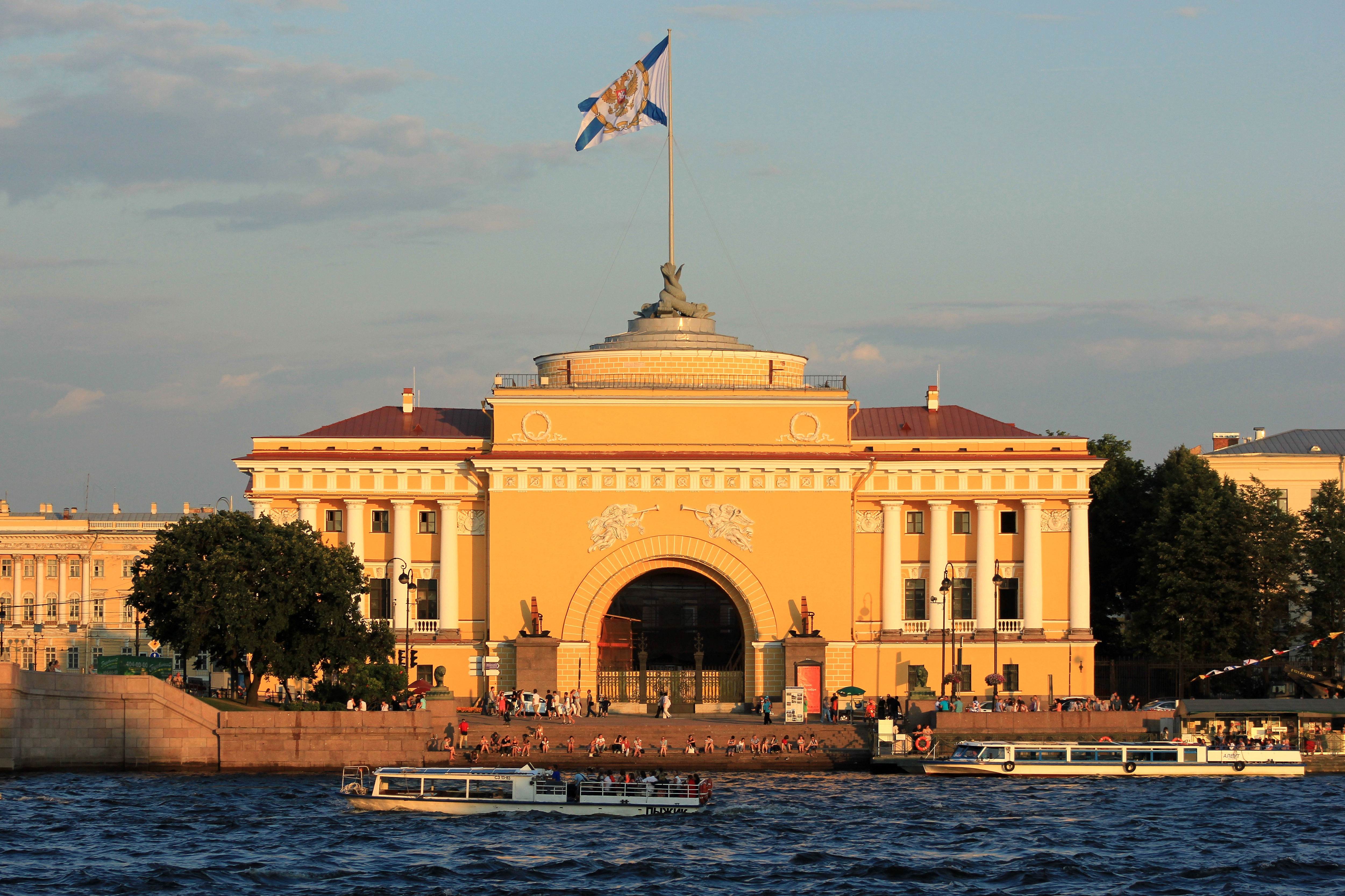 Здание Адмиралтейства на вечернем солнце... Санкт-Петербург. Россия.